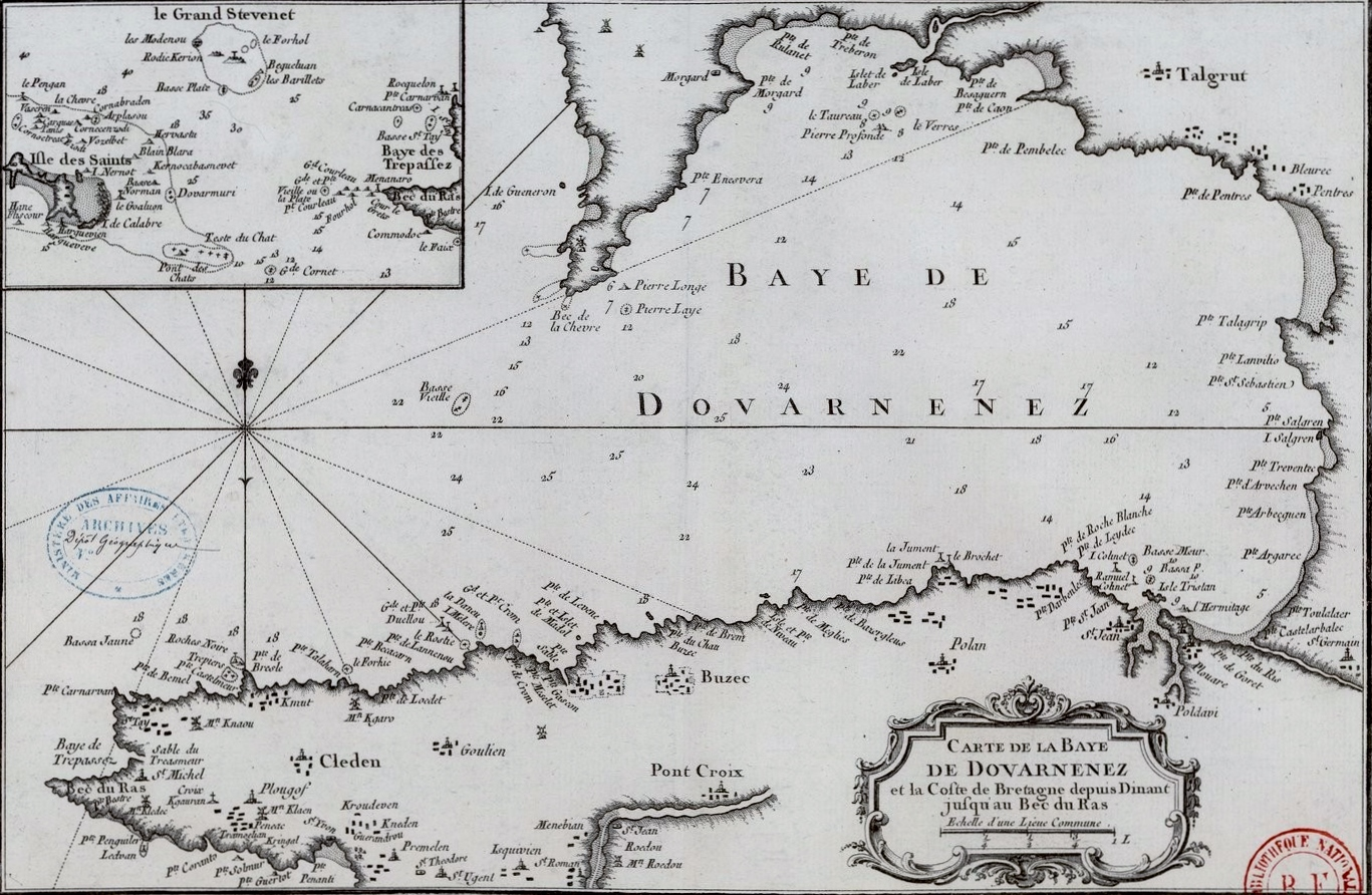 Carte de la baye de Douarnenez et la coste de Bretagne depuis Dinant jusqu'au Bec du Ras par Jacques-Nicolas Bellin, datant de 1764